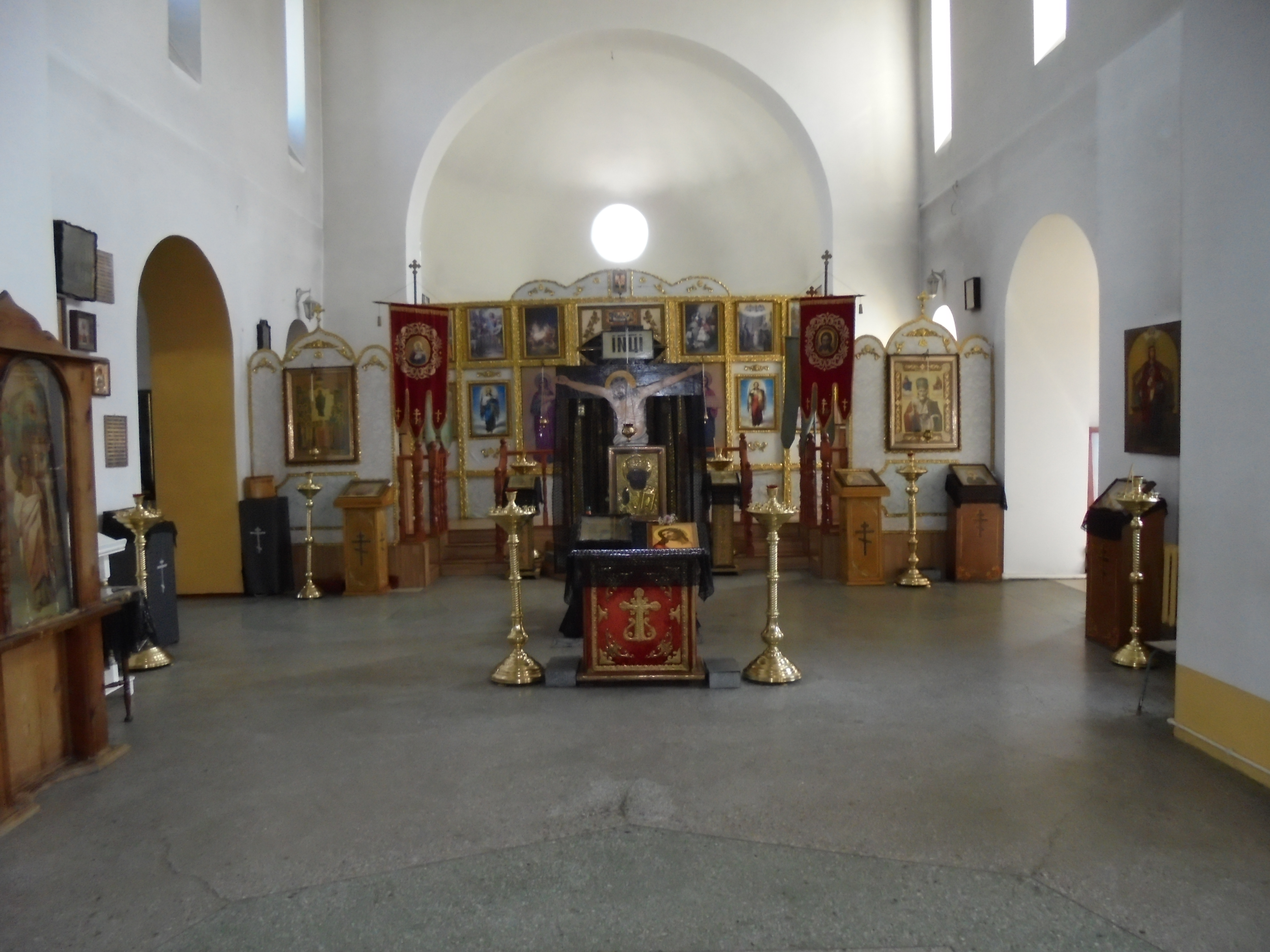 Церковь Николая Чудотворца в поселке Аютинский (Шахты).